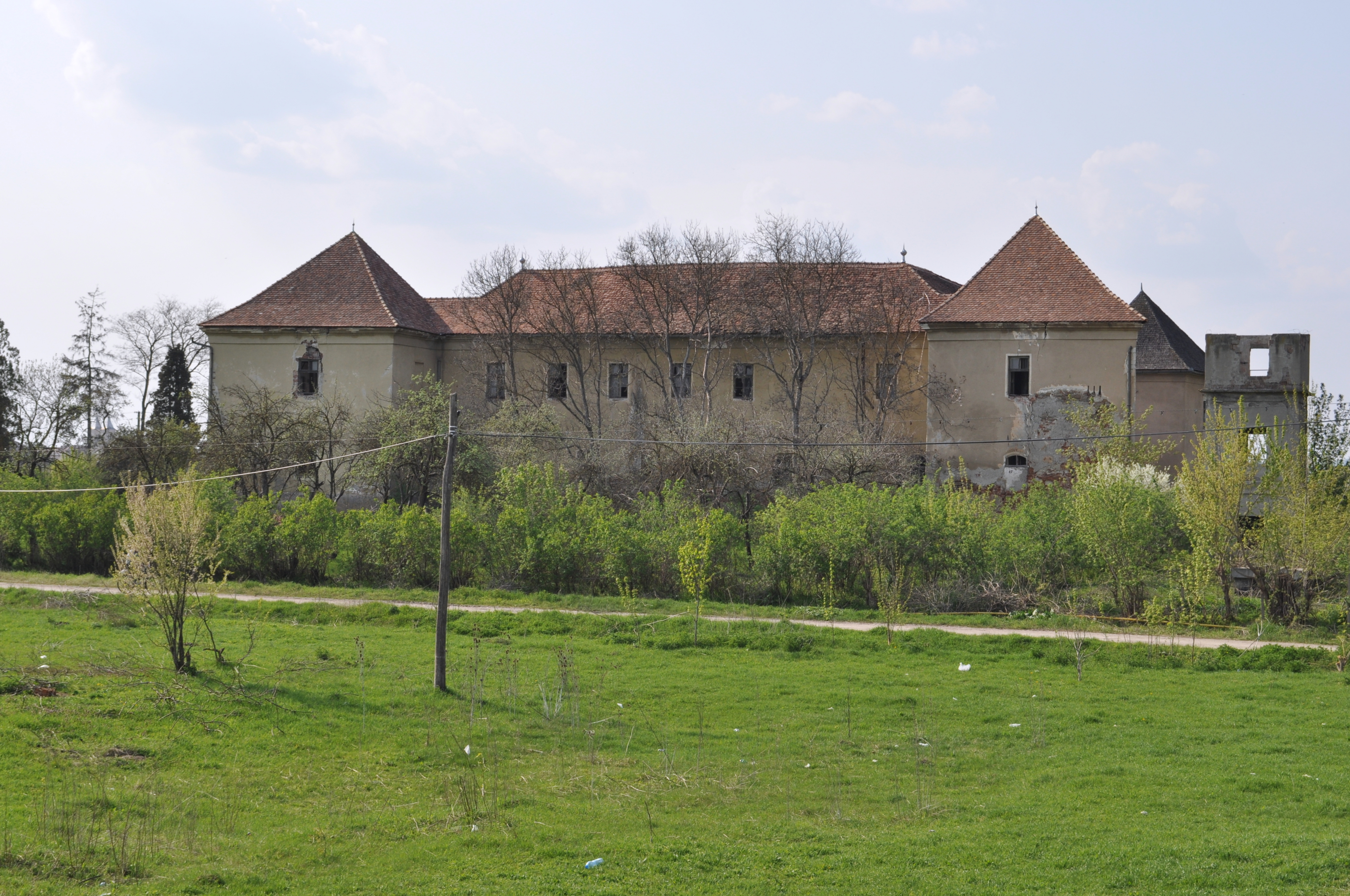 Castelul Kornis-Rakoczy-Bethlen din Iernut